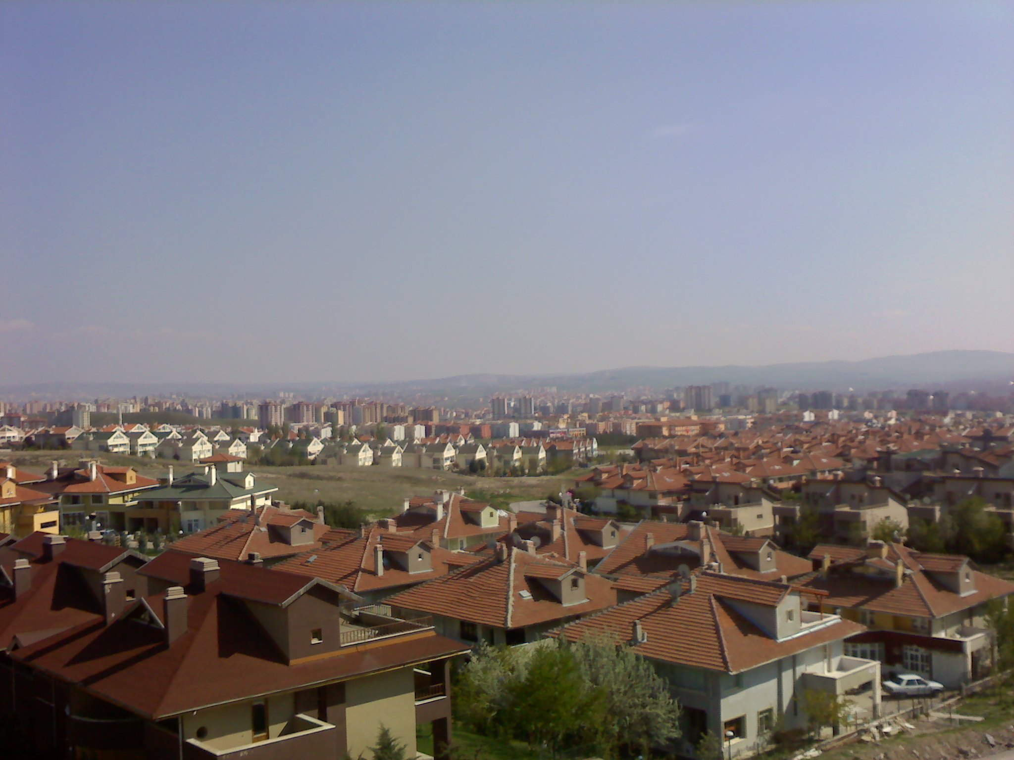 3. Etap Tepeden görünüş